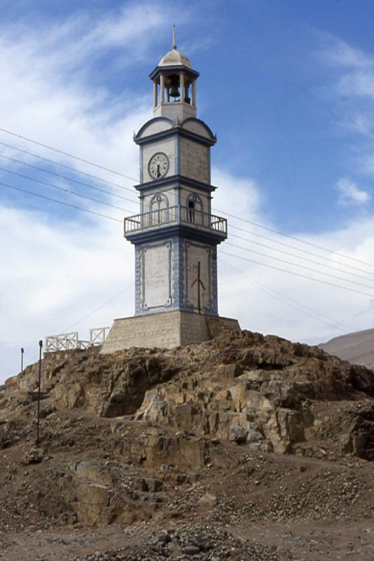 Klockenturm von Pisagua